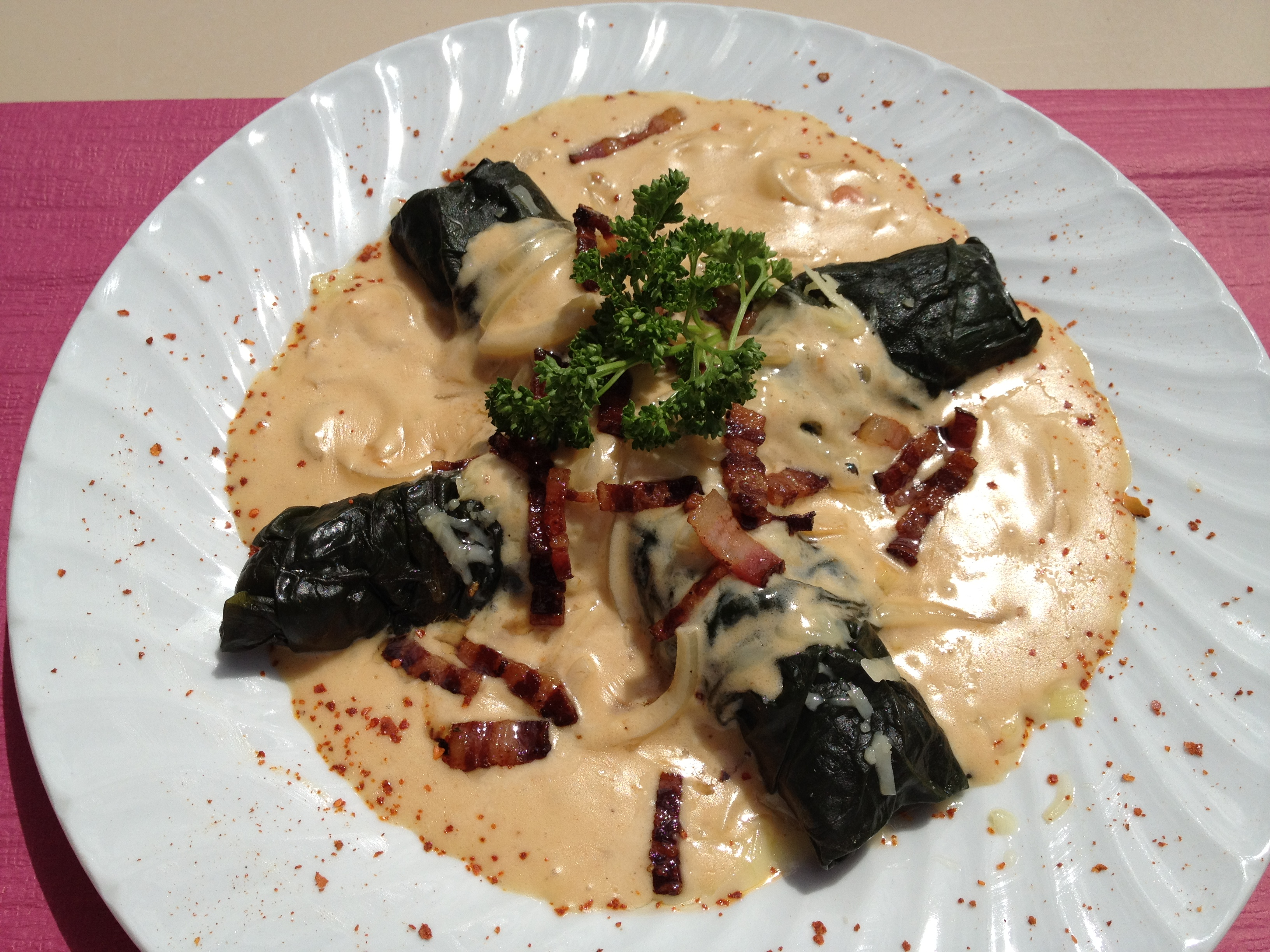 Capuns